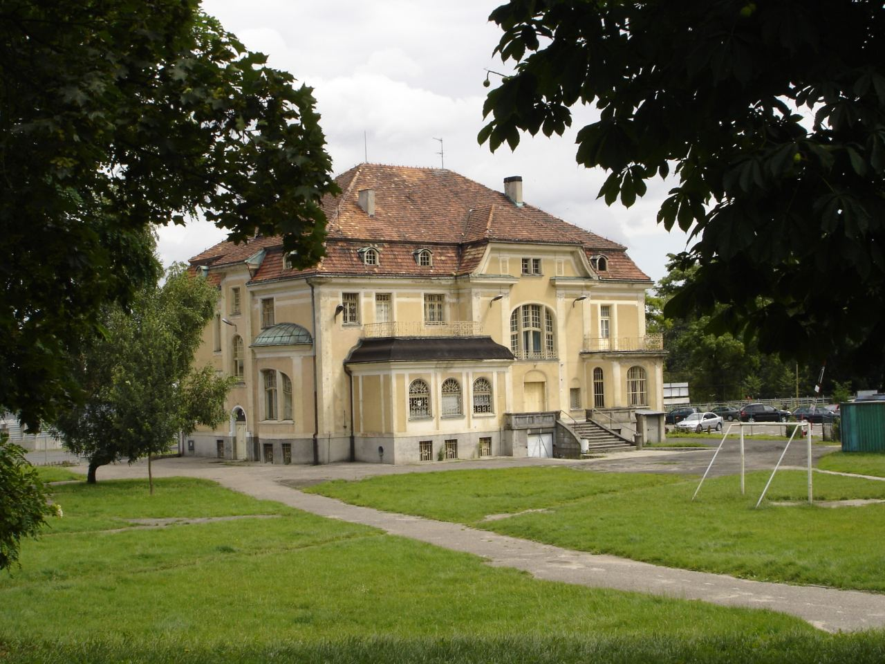 Home of culture in Stargard Szczeciński